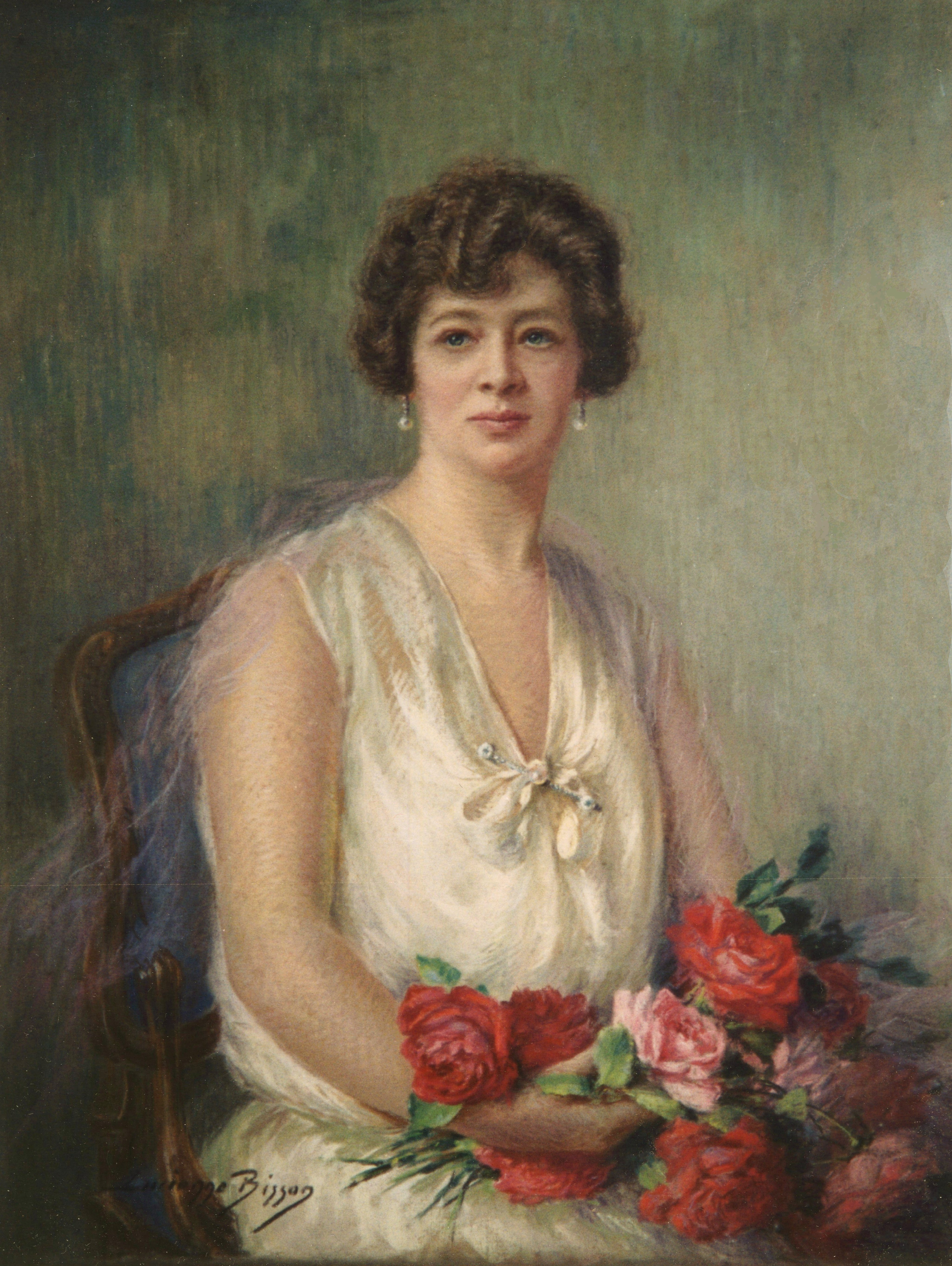 Portrait de madame Griffon